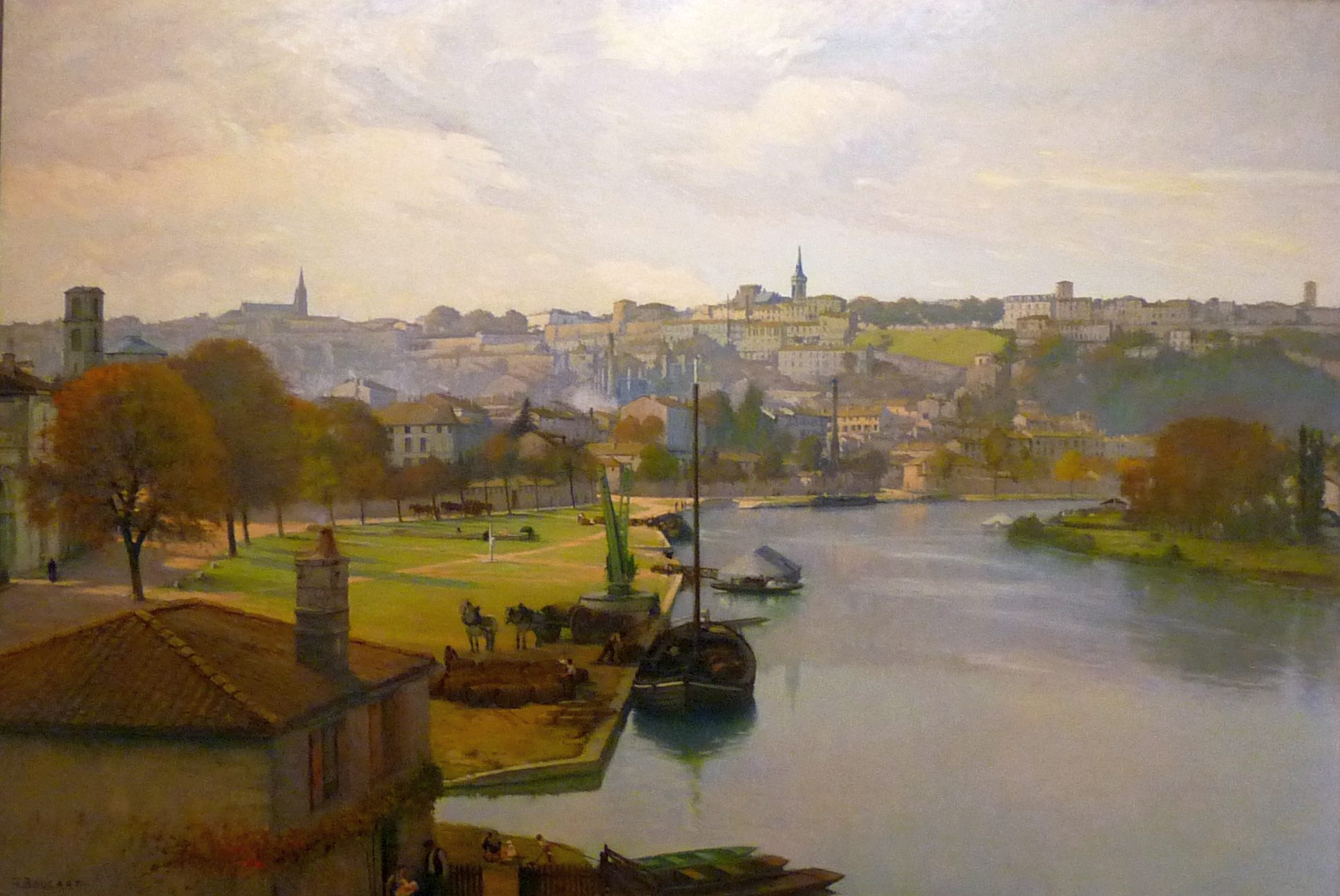 peinture du port de l'Houmeau, Gaston Boucart, 1927, musée d'Angoulême, France, d'après une vue monochrome de 1886.